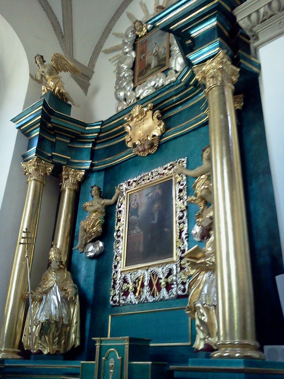 Zamość, kościół kolegiacki p.w. Zmartchwywstania Pańskiego, 1587, 1600, XVIII, 1824-1825